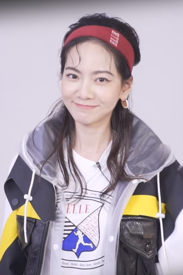 2019ELLE RUN 復古風格音樂路跑你報名了嗎？